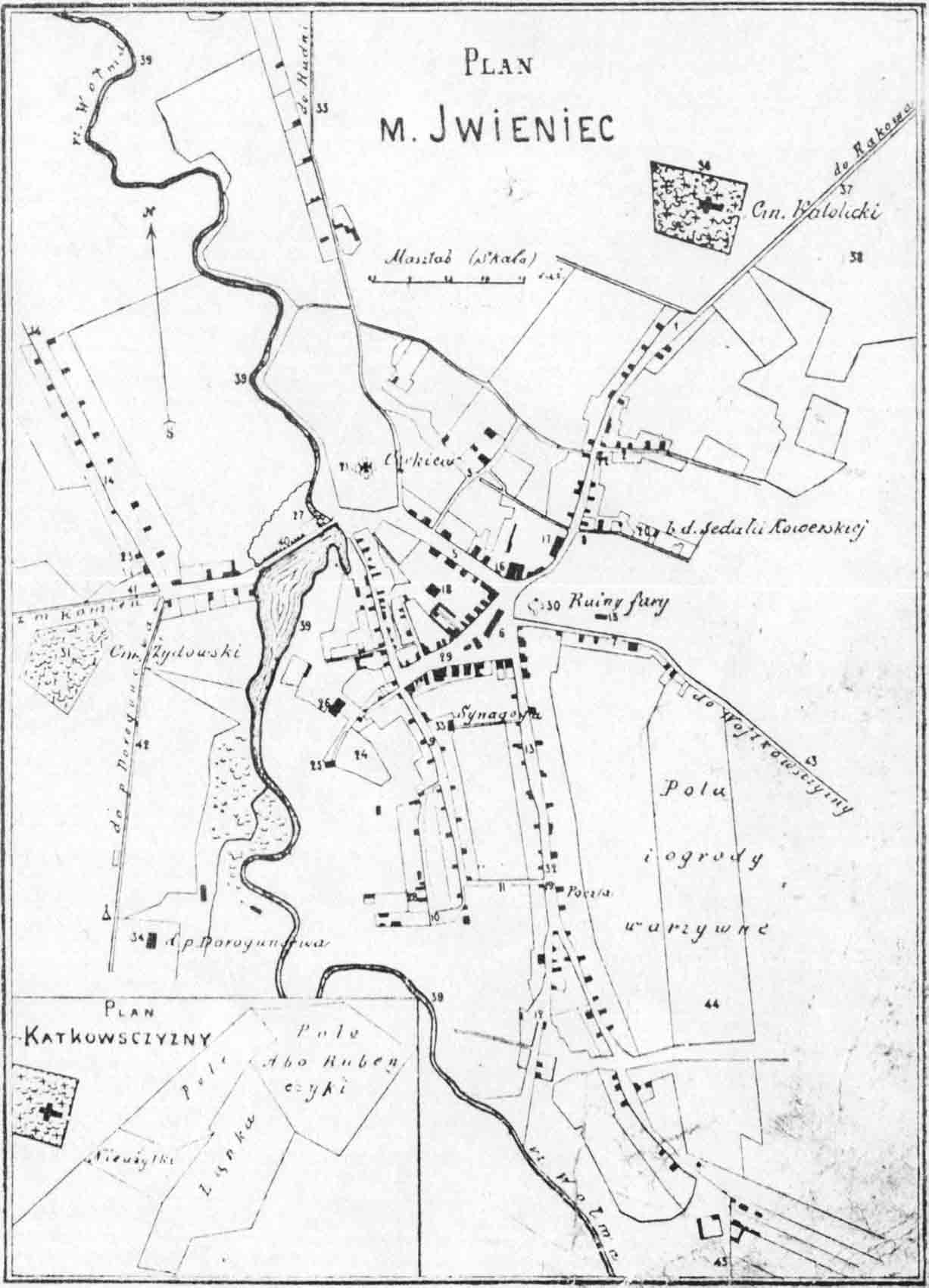 Беларуская (тарашкевіца): Івянец (Ivianiec). Плян мястэчка